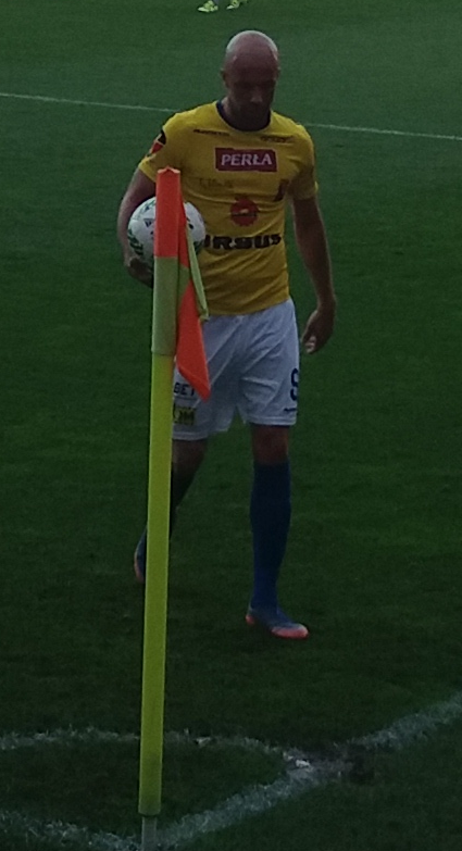 Paweł Kaczmarek - Motor Lublin 2017